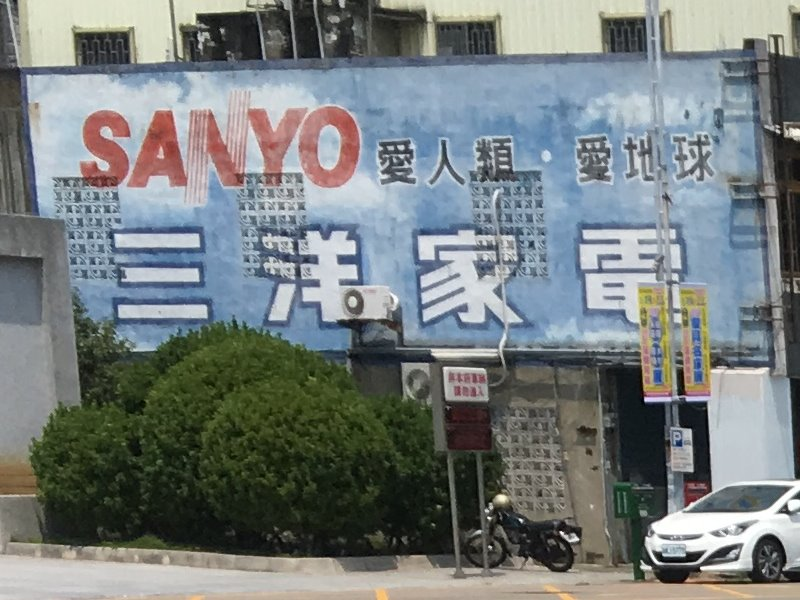 苗栗縣苗栗市，台灣三洋電機三洋家電廣告牆。